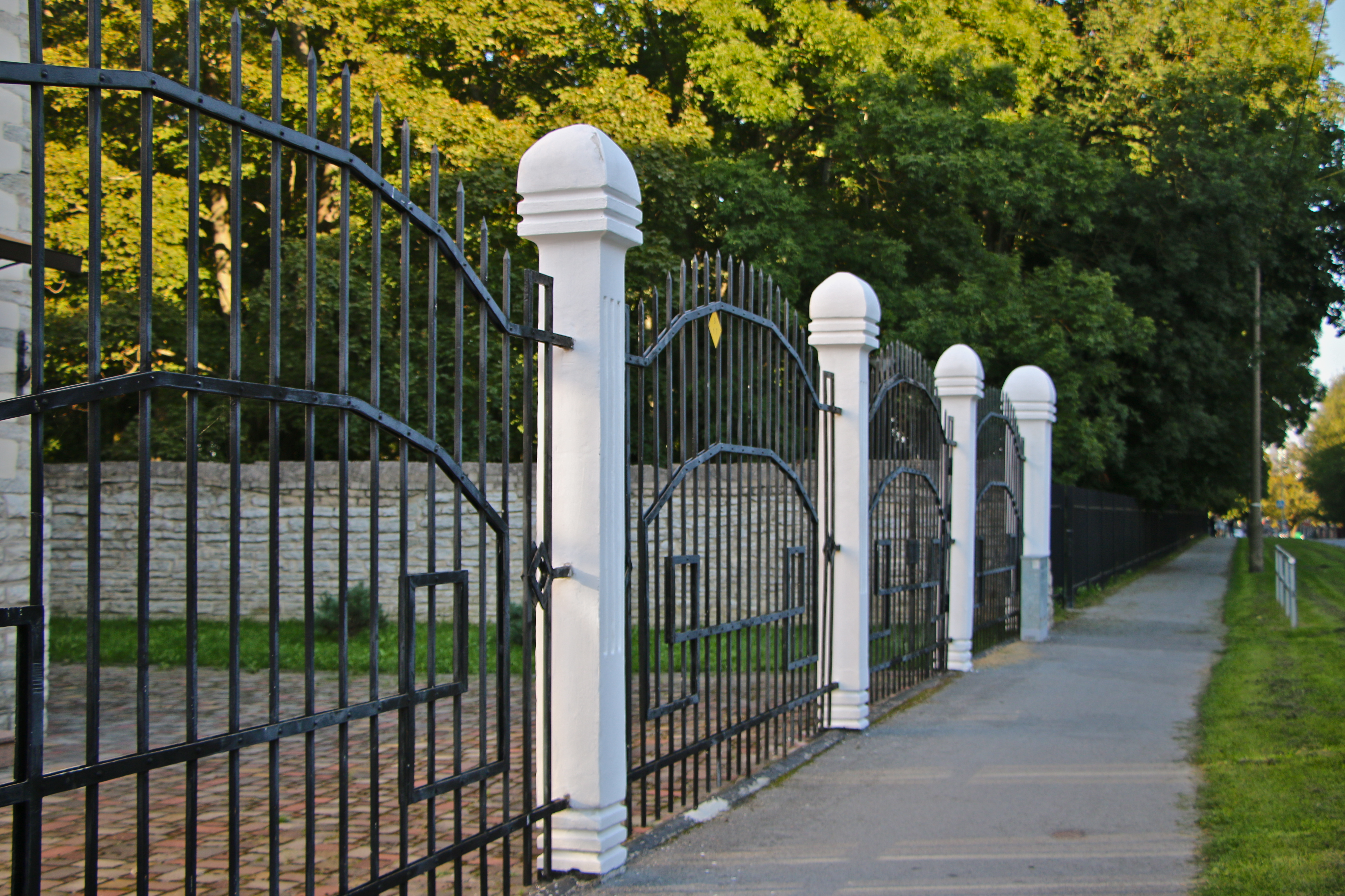 Kultuurimälestis 8610